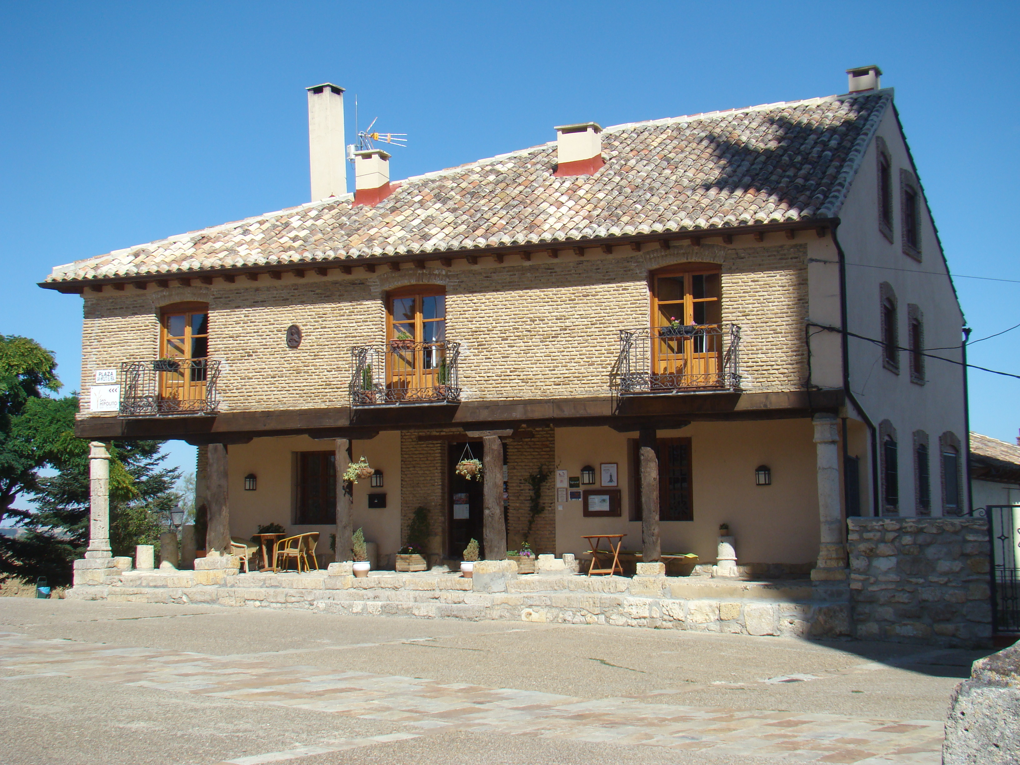 Támara de Campos (Palencia, España). Casa porticada en la plaza de San Hipólito; ejemplo de arquitectura popular.